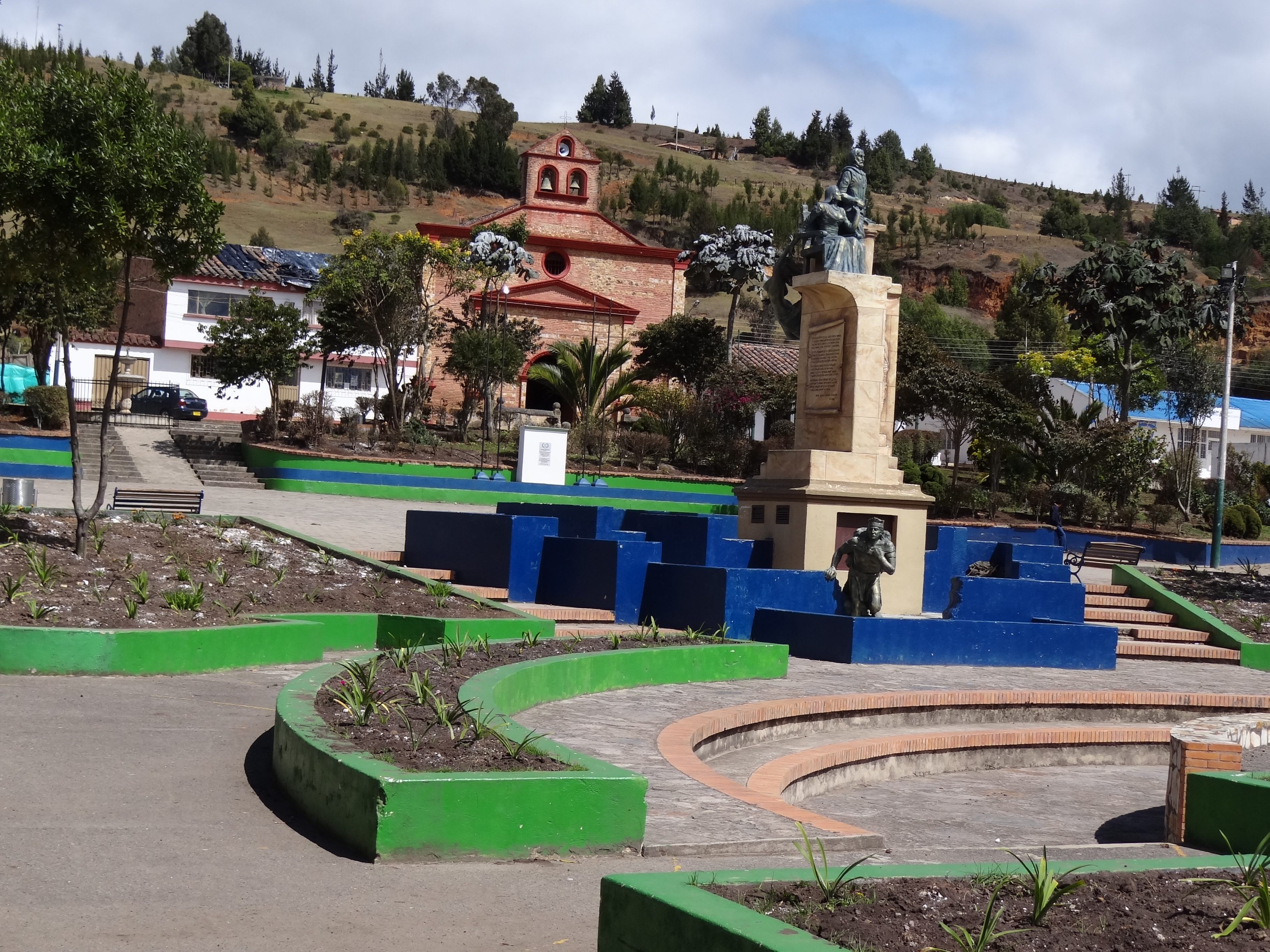 Parque del municipio de Chivatá, departamento de Boyacá, Colombia